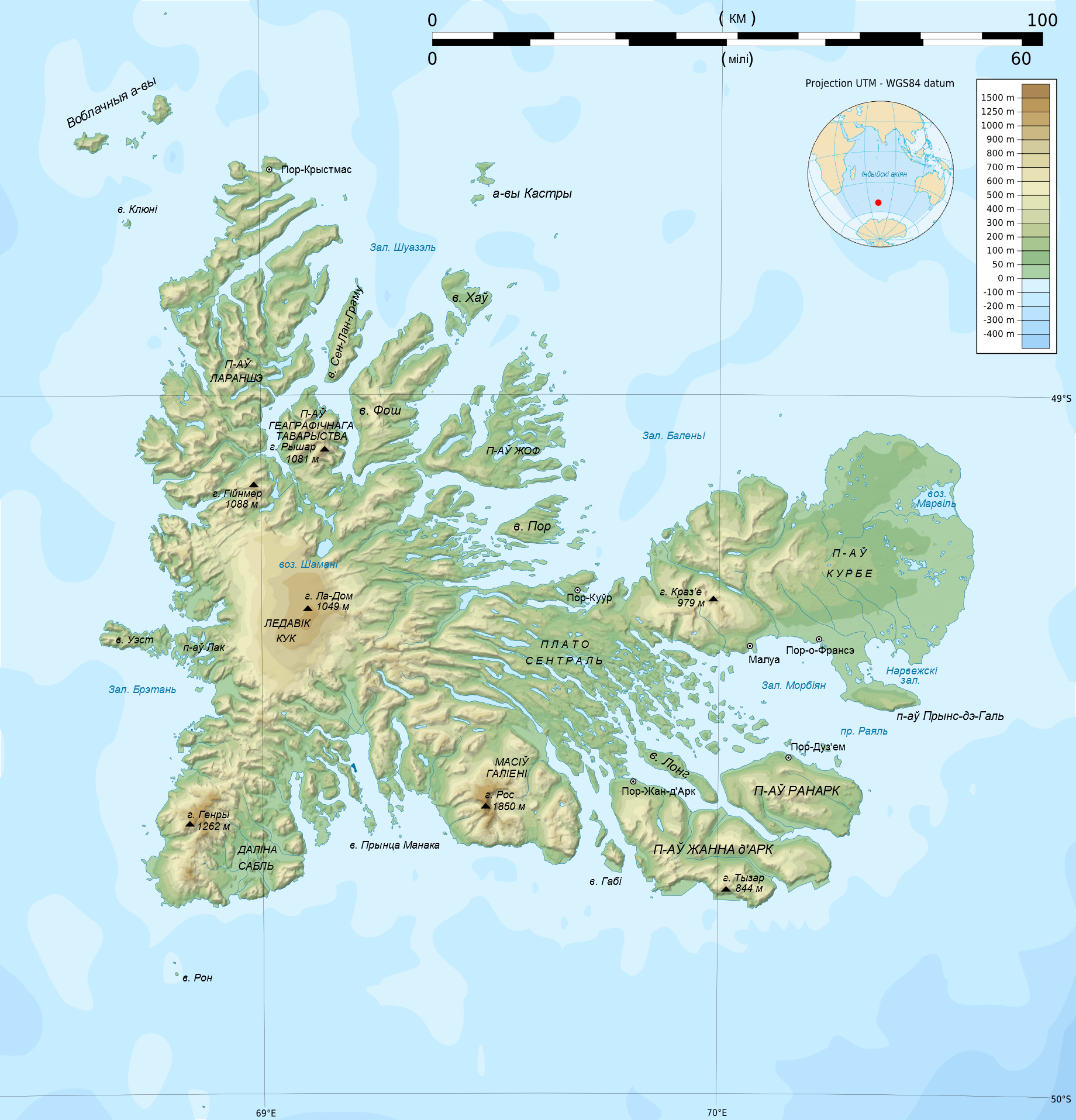 be:Кергелен